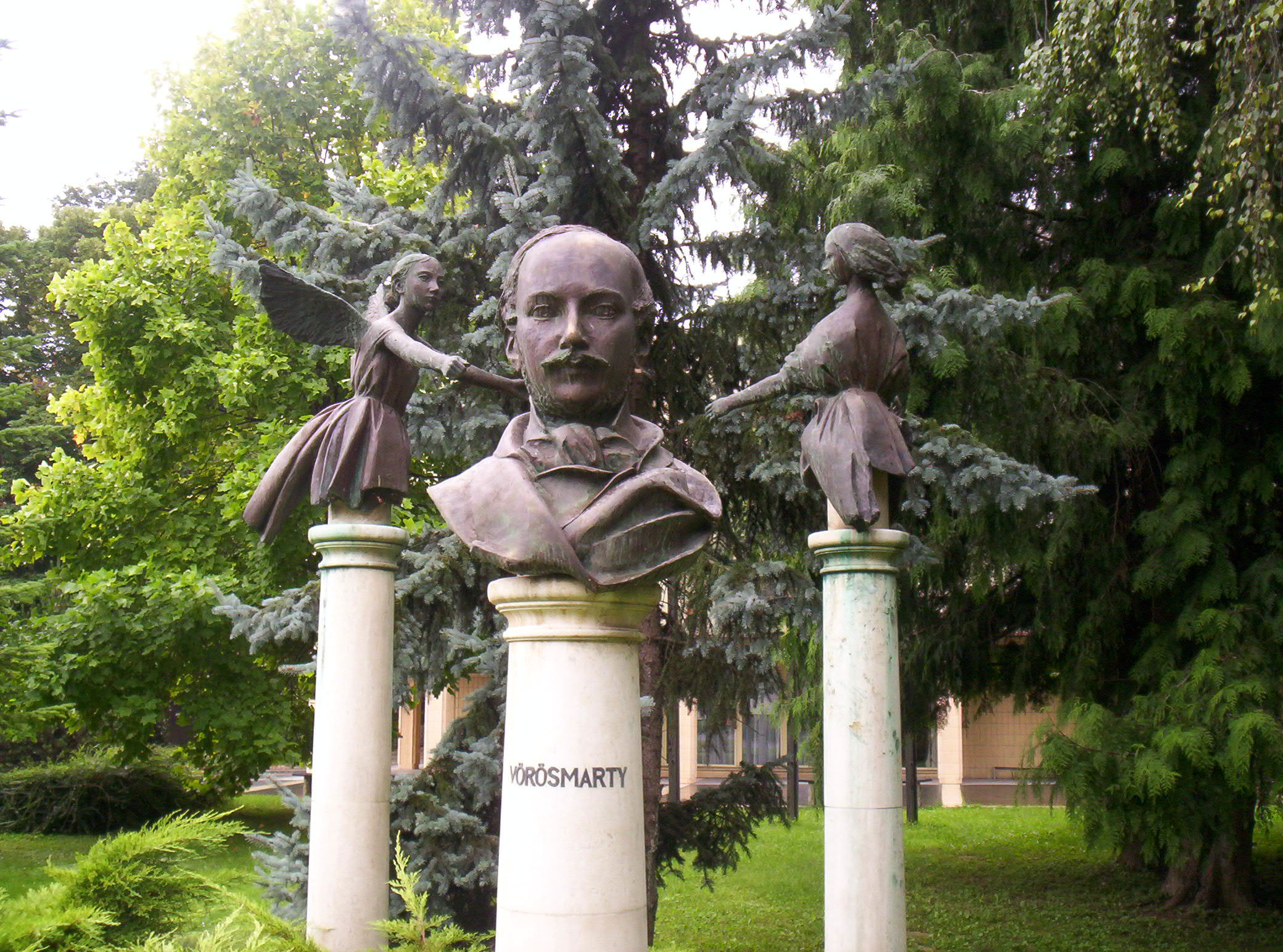 Vörösmarty Mihály szobra Bonyhádon, Zrínyi Miklós utca (Szabó György alkotása, 1990) A művelődési ház előtt a parkban látható. – photo taken by the uploader 2005 Vörösmarty Mihály-szobor Statue of poet Mihály Vörösmarty in Bonyhád.